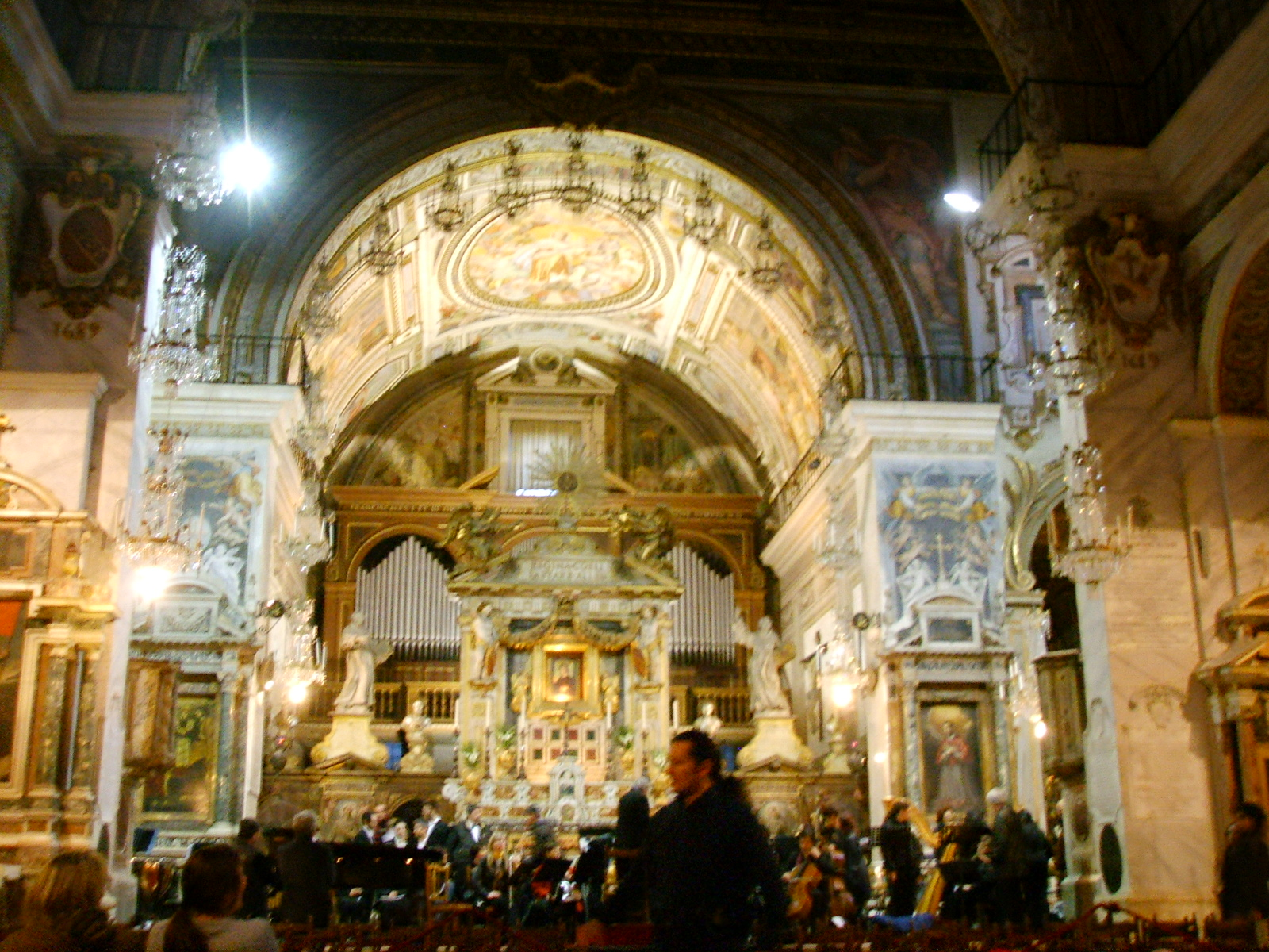 Basilica di Santa Maria in Ara Coeli, interno